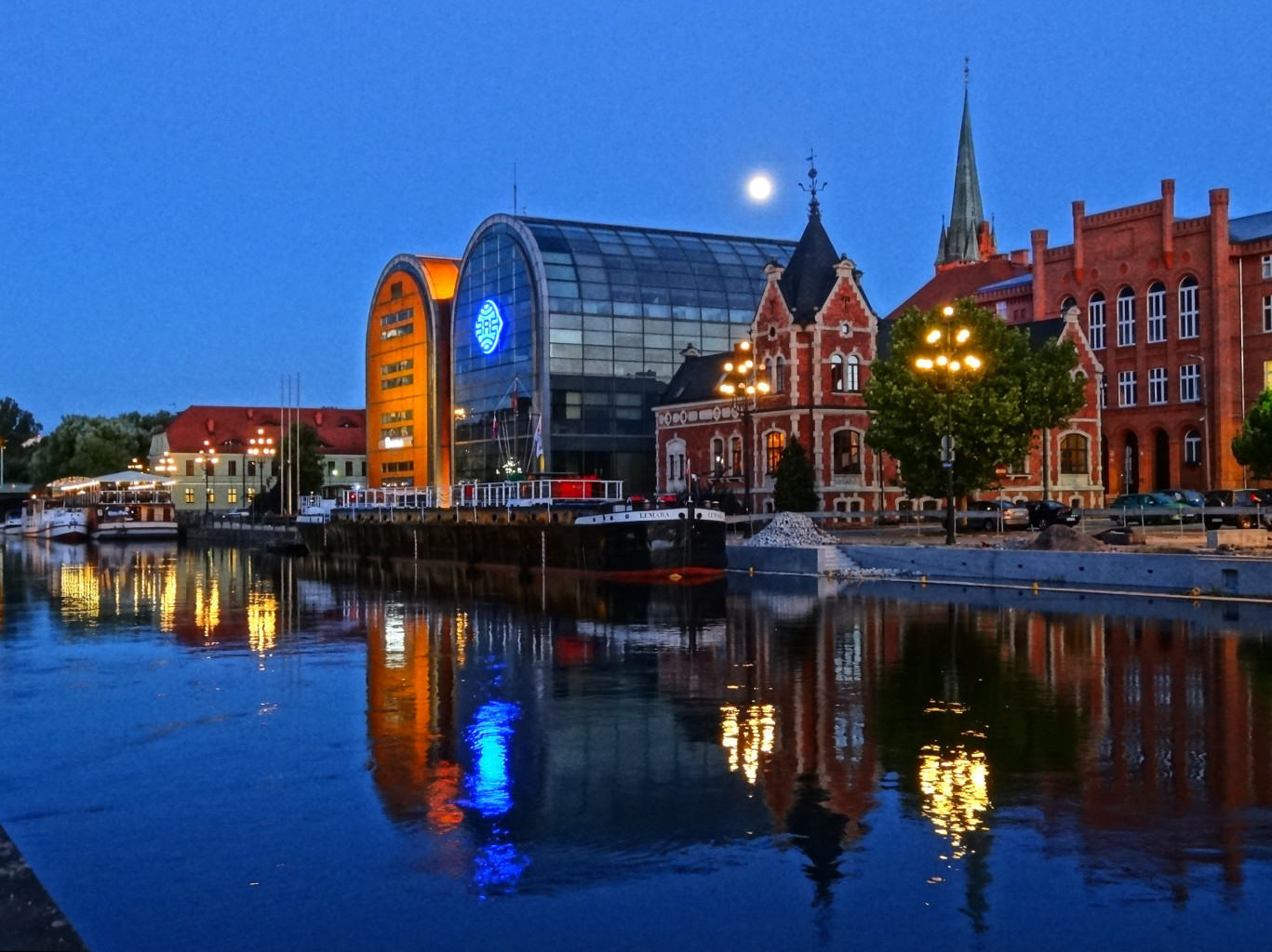 Południowe nabrzeże Brdy w centrum Bydgoszczy. Widoczne tzw. szklane spichrze i pałacyk Lloyda